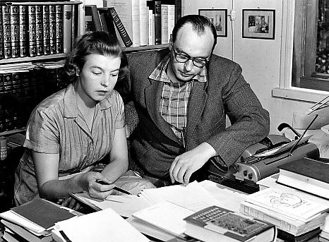 Helena Anhava